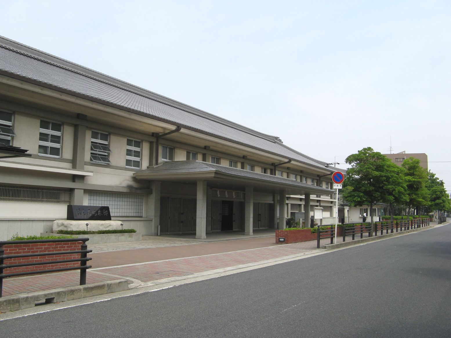 ほんみち本部 2008年6月10日 Bakkai撮影